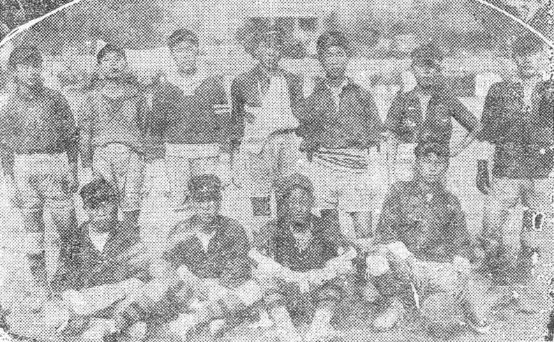 1923년 전국체육대회 축구(제4회 전조선축구대회) 소학부 종목에서 우승한 광성공립보통학교 선수단의 모습.